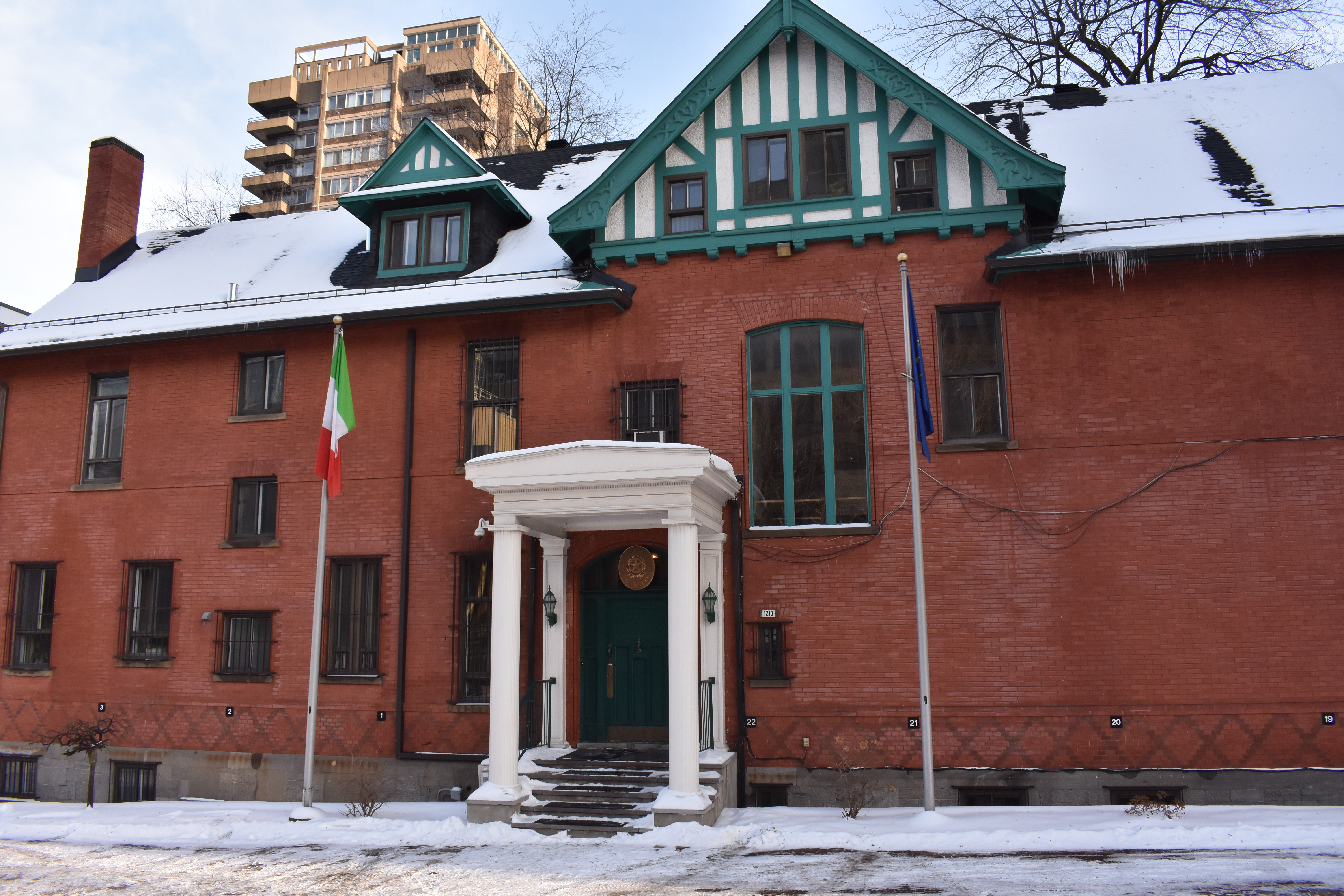 Consulat général d'Italie